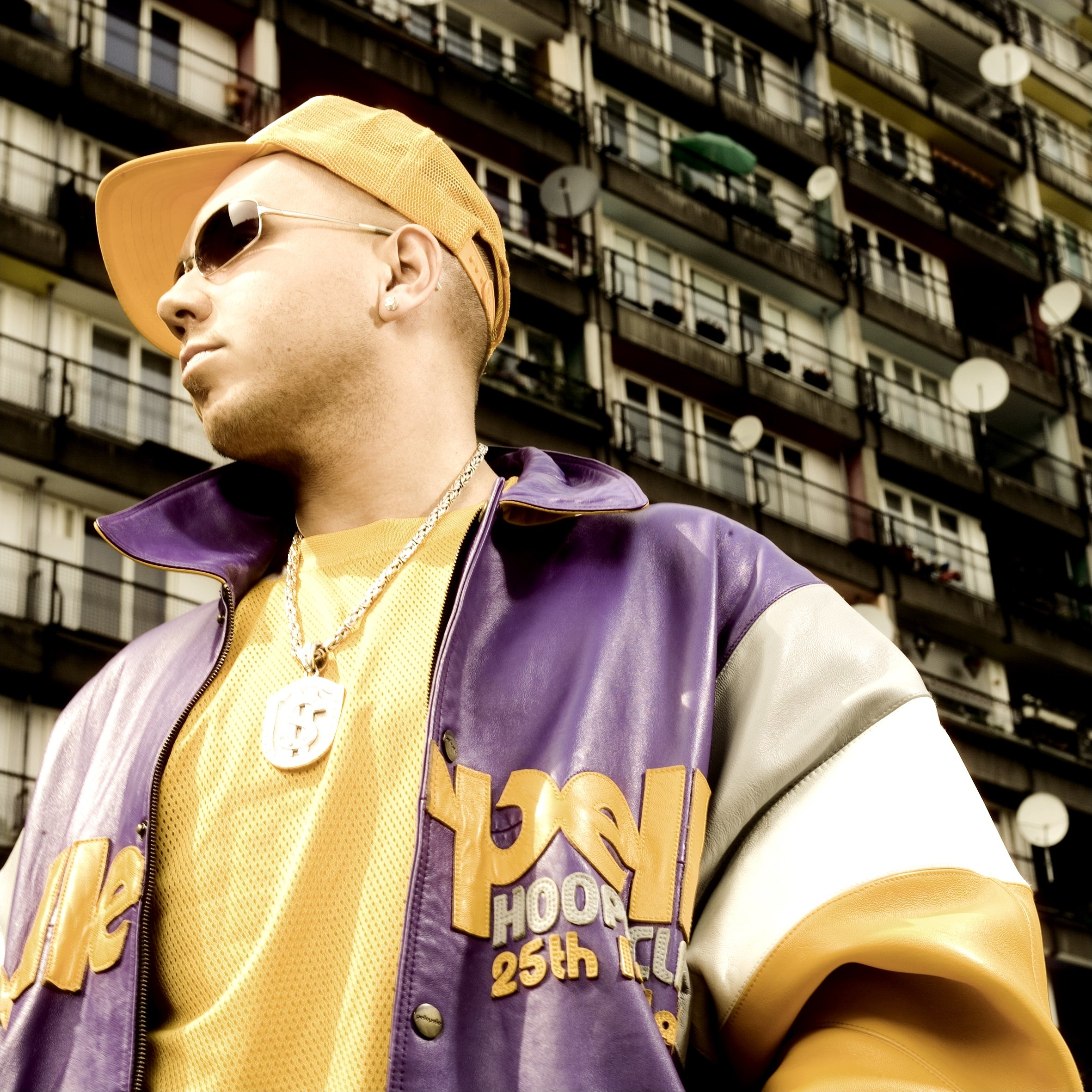 DJ Tomekk